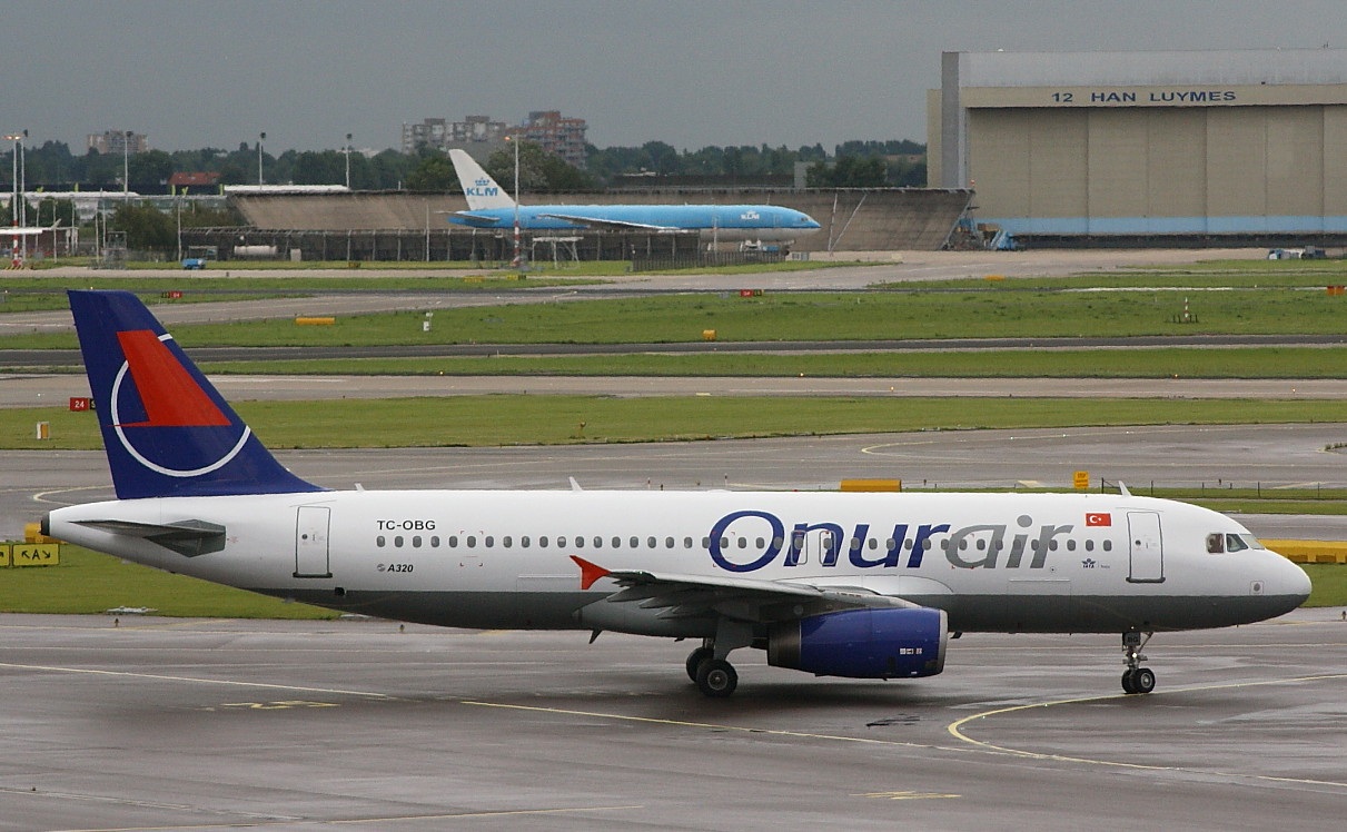 Airbus A320 op schiphol